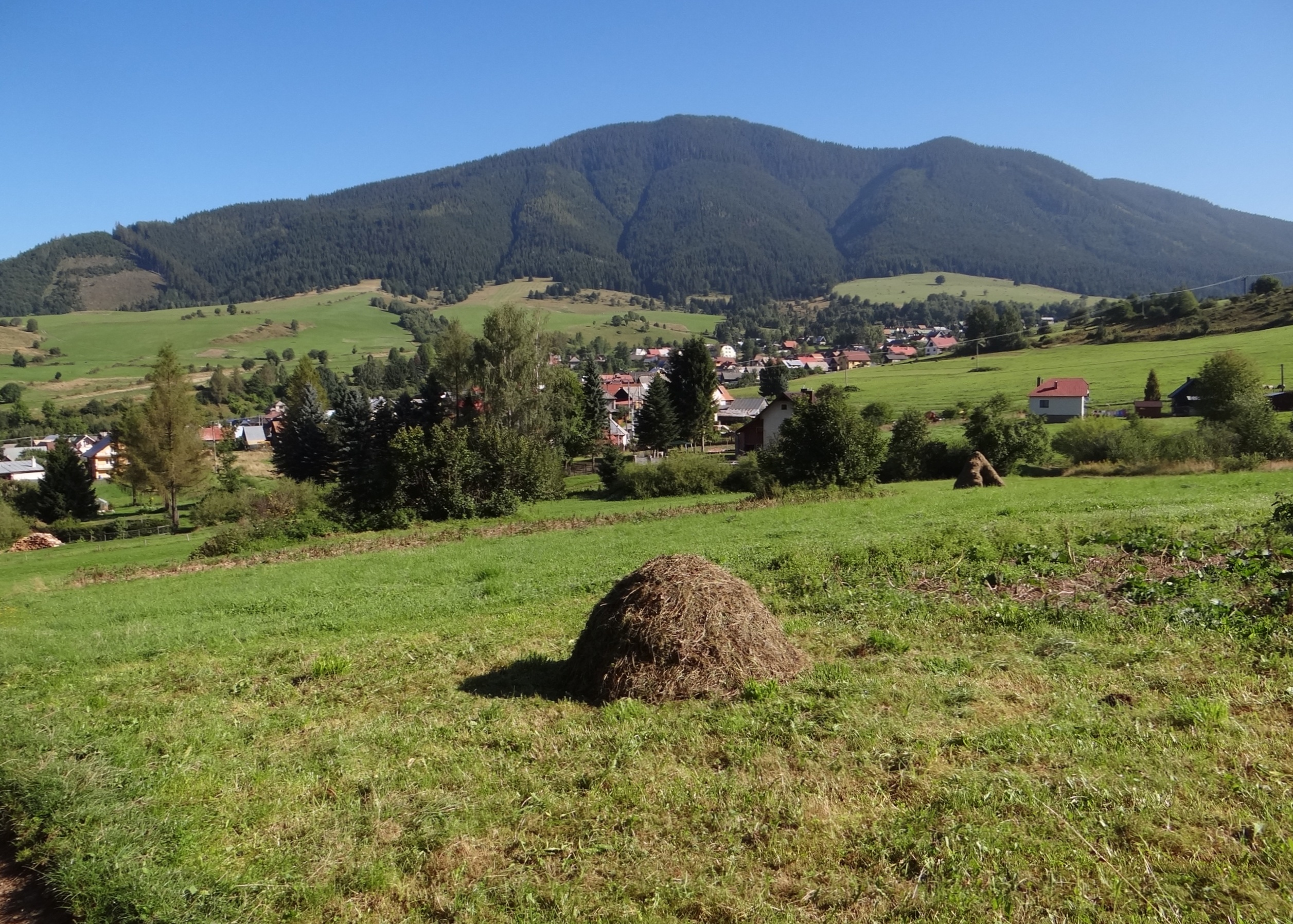 Tlstá